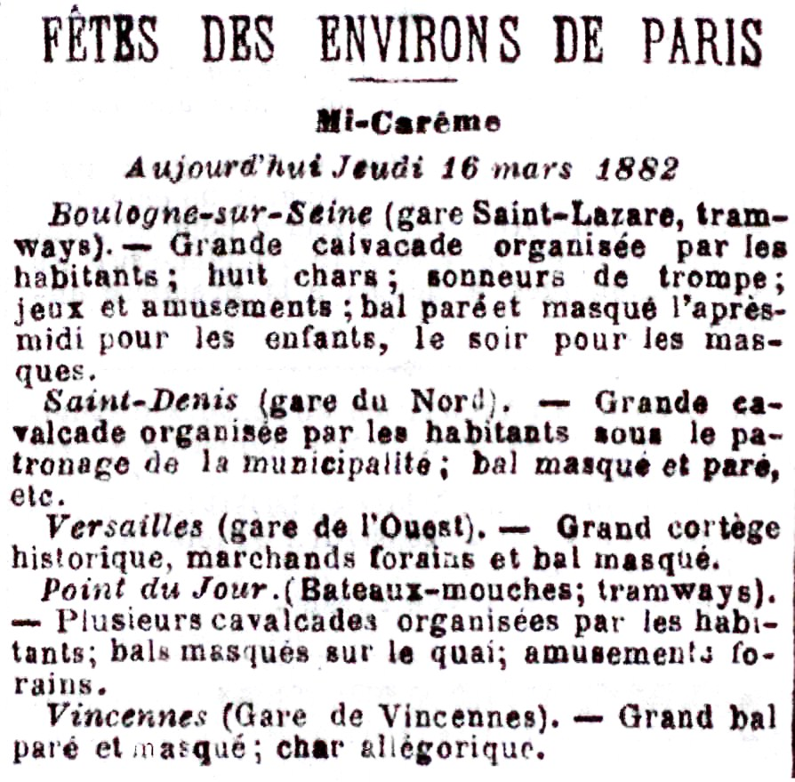 Annonce des festivités de la Mi-Carême 1882 dans la banlieue de Paris.